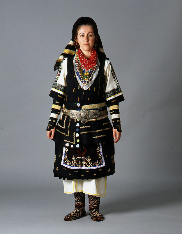 Φορεσιά Σαρακατσάνας γνωστή ως "Βουλγαρίνα". Συλλογή Πελοποννησιακού Λαογραφικού Ιδρύματος, Ναύπλιο